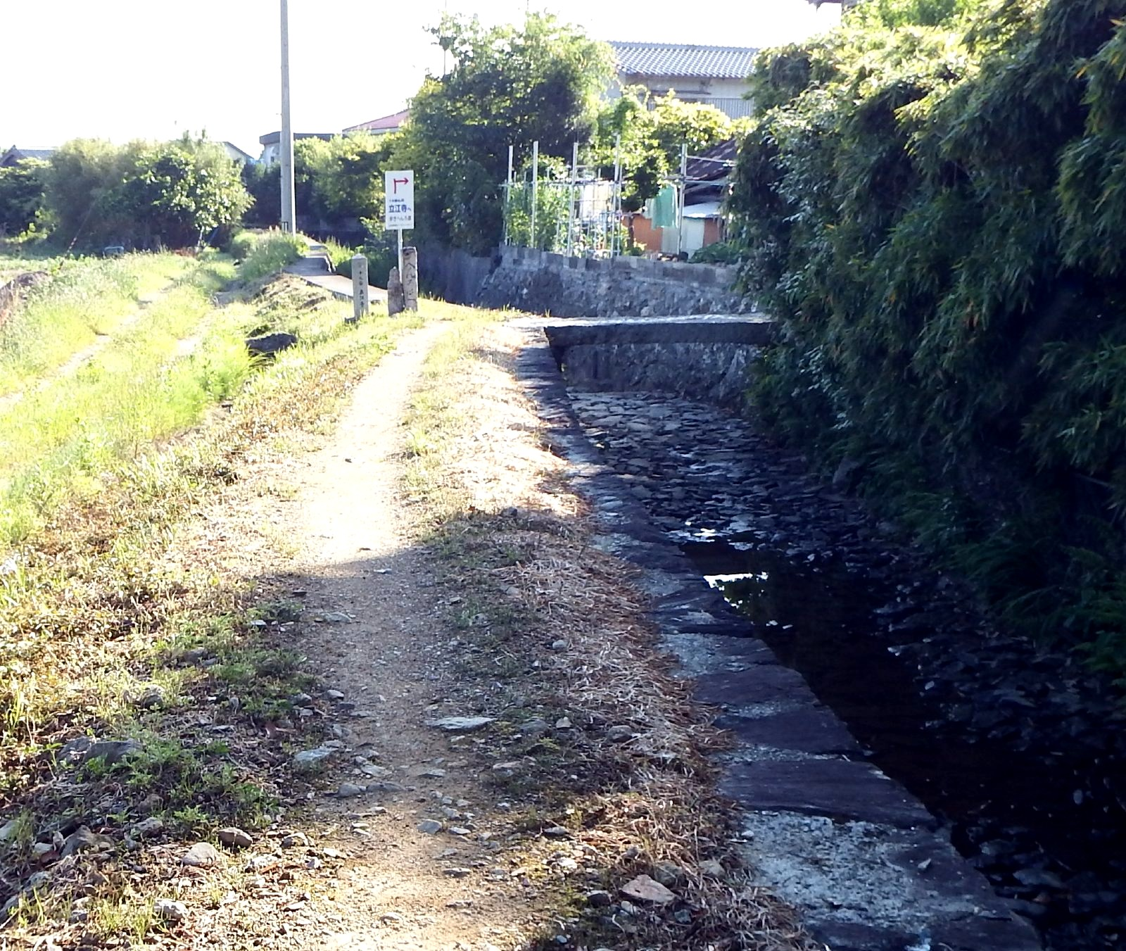 阿波遍路道 立江寺道